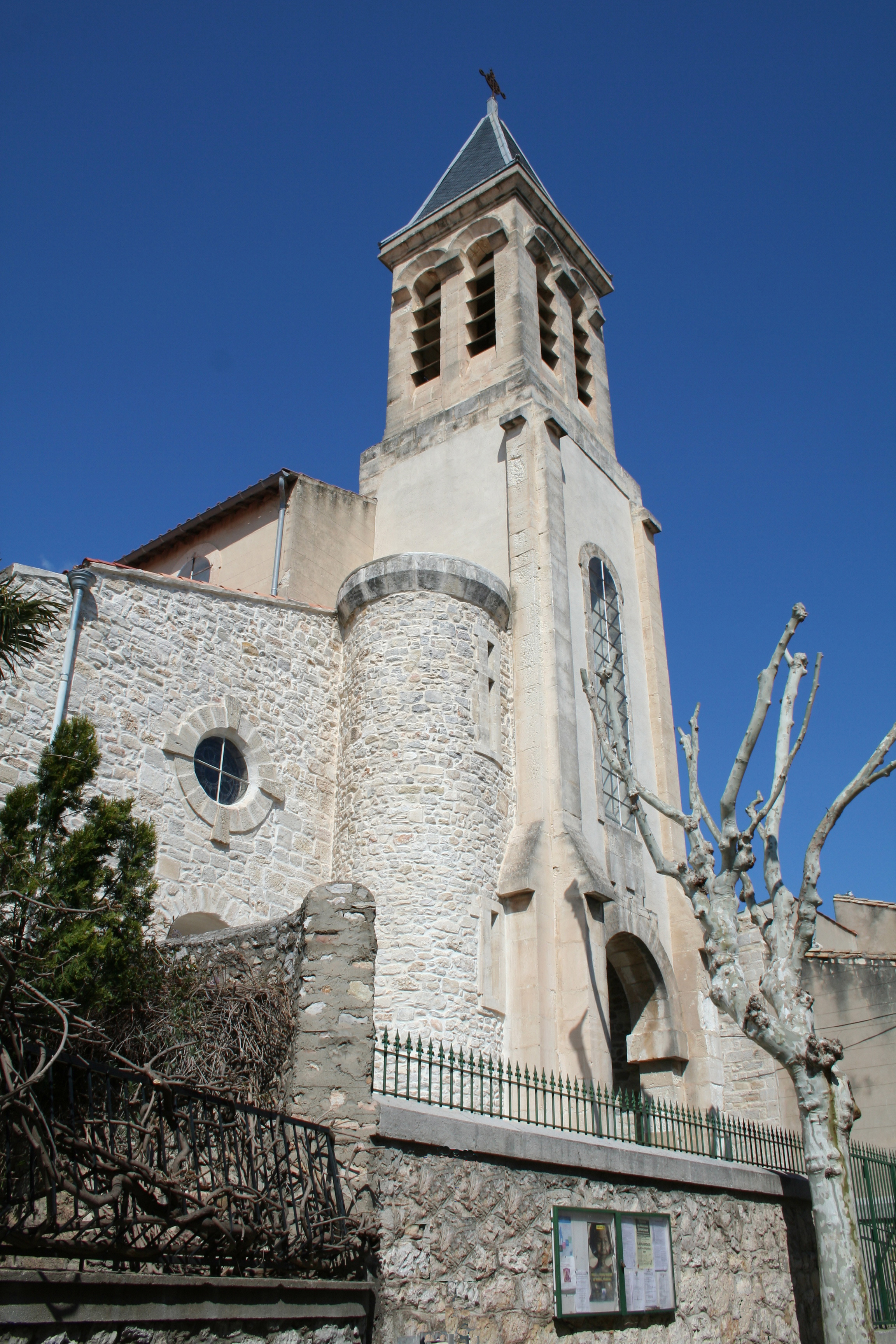 Mireval (Hérault) - église Sainte-Eulalie de Mérida.